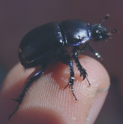 Anoplotrupes stercorosus leider schwierig zu fotografieren, aber vielleicht besser als nichts.